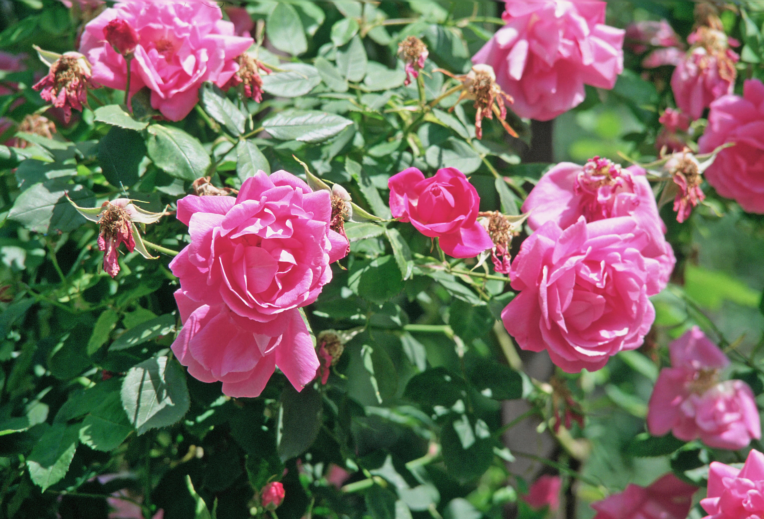 Rosa 'Adam Messerich', gr. Borbonianas, sect. Chinensis. Real Jardín Botánico, Madrid